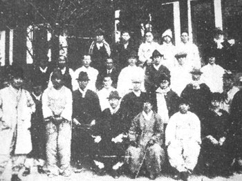 1936년12월 25일, 서대문 경찰서에서 붙잡힌 이재유 사진(앞줄 왼쪽에서 세 번째 두 손이 묶인 사람이 이재유.)